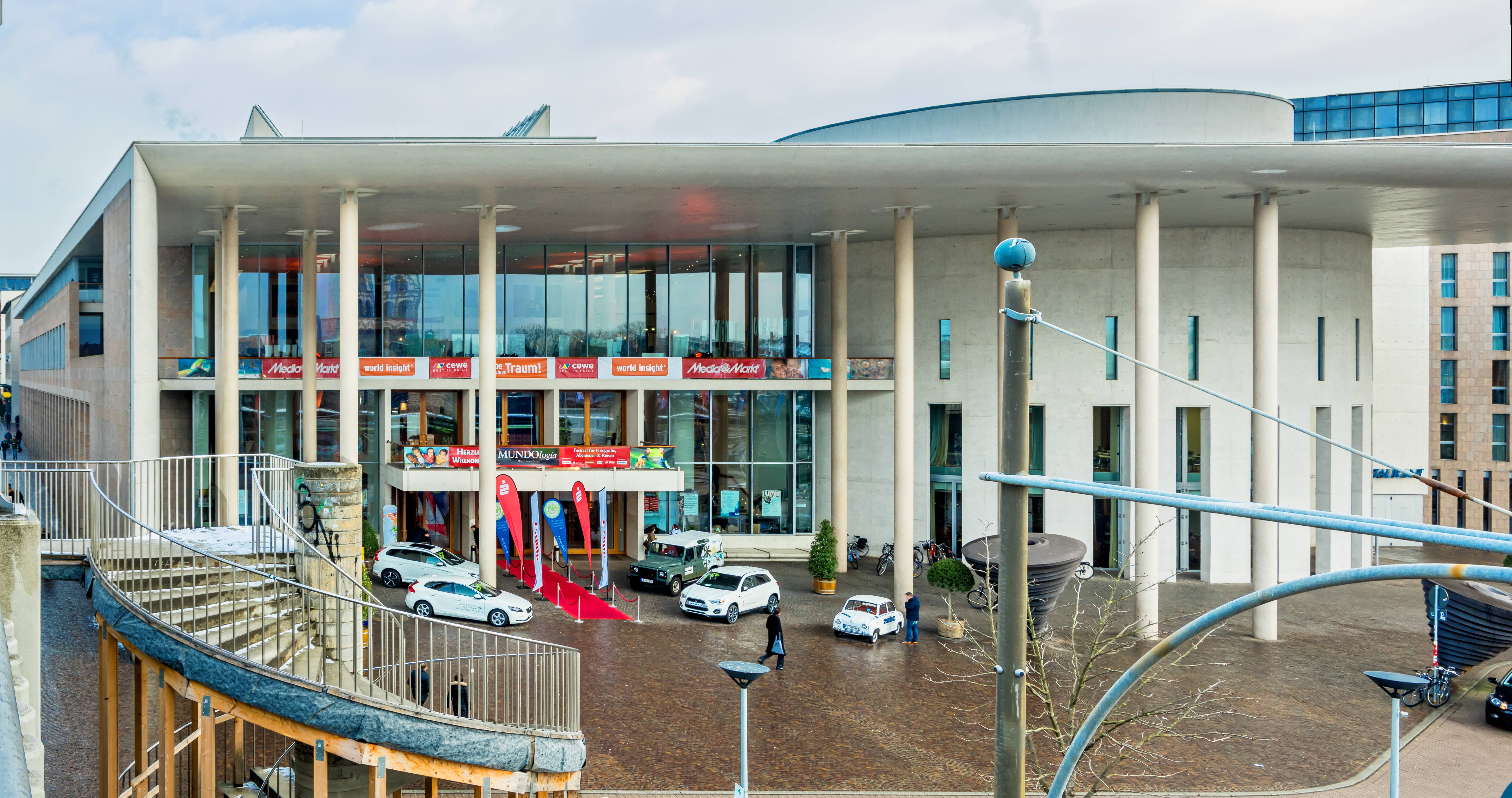 Bilder von der Mundologia 2015 Bilder von der Mundologia 2015